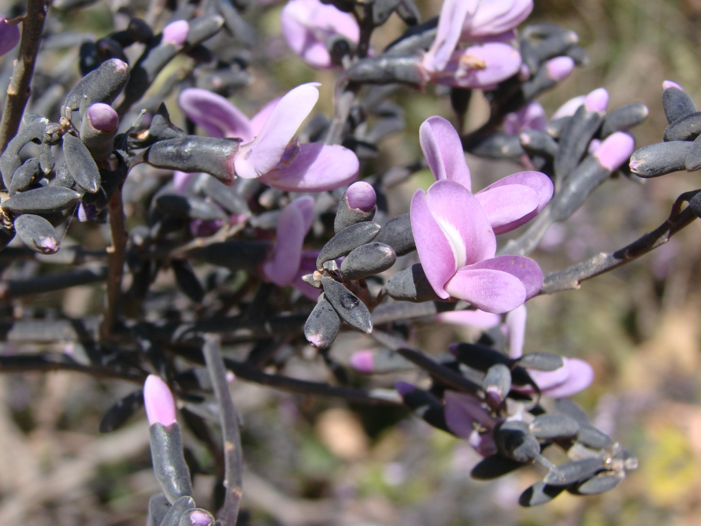 Andira anthelmia - FABACEAE - Parque Nacional do Grande Sertão Veredas - Chapada Gaúcha - Minas Gerais - Brasil.